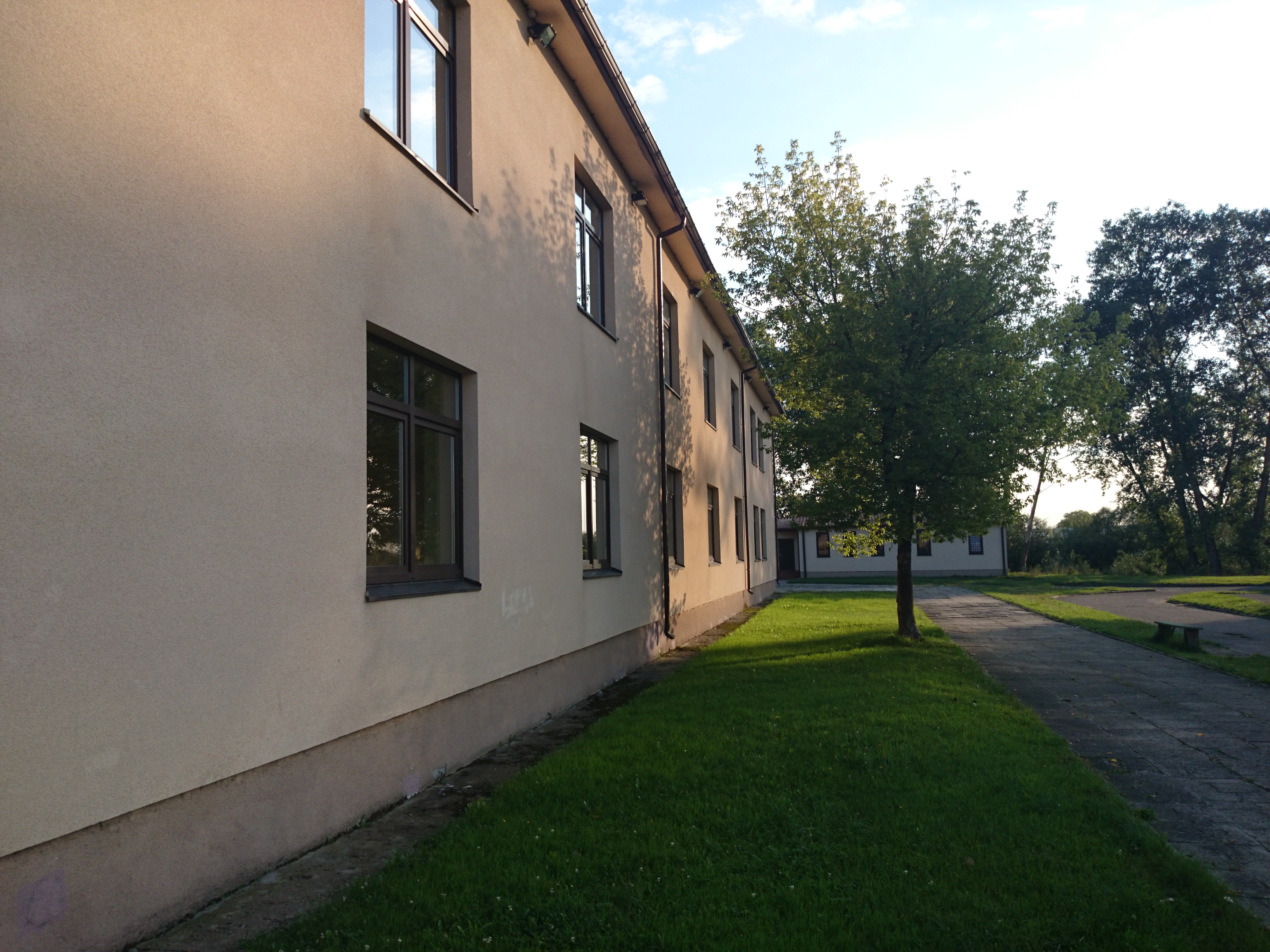 Lietavos pagrindinė mokykla